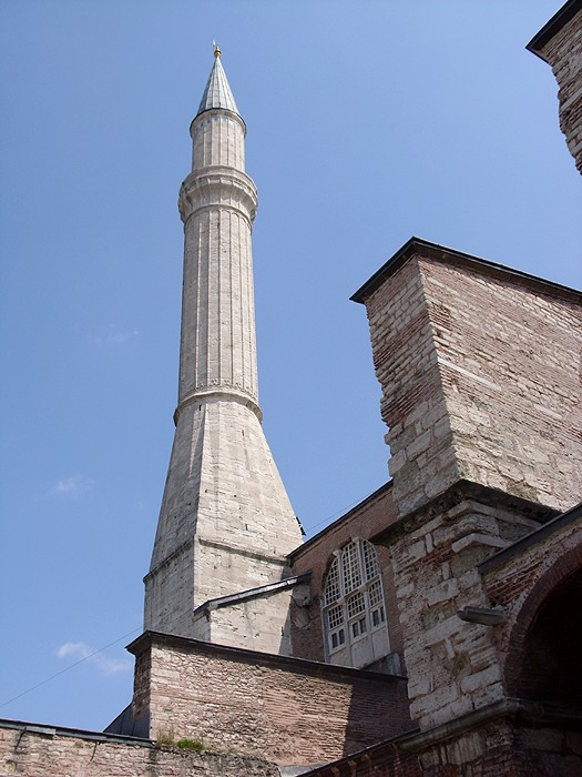 Istanbul - Minareto della Basilica di S. Sofia